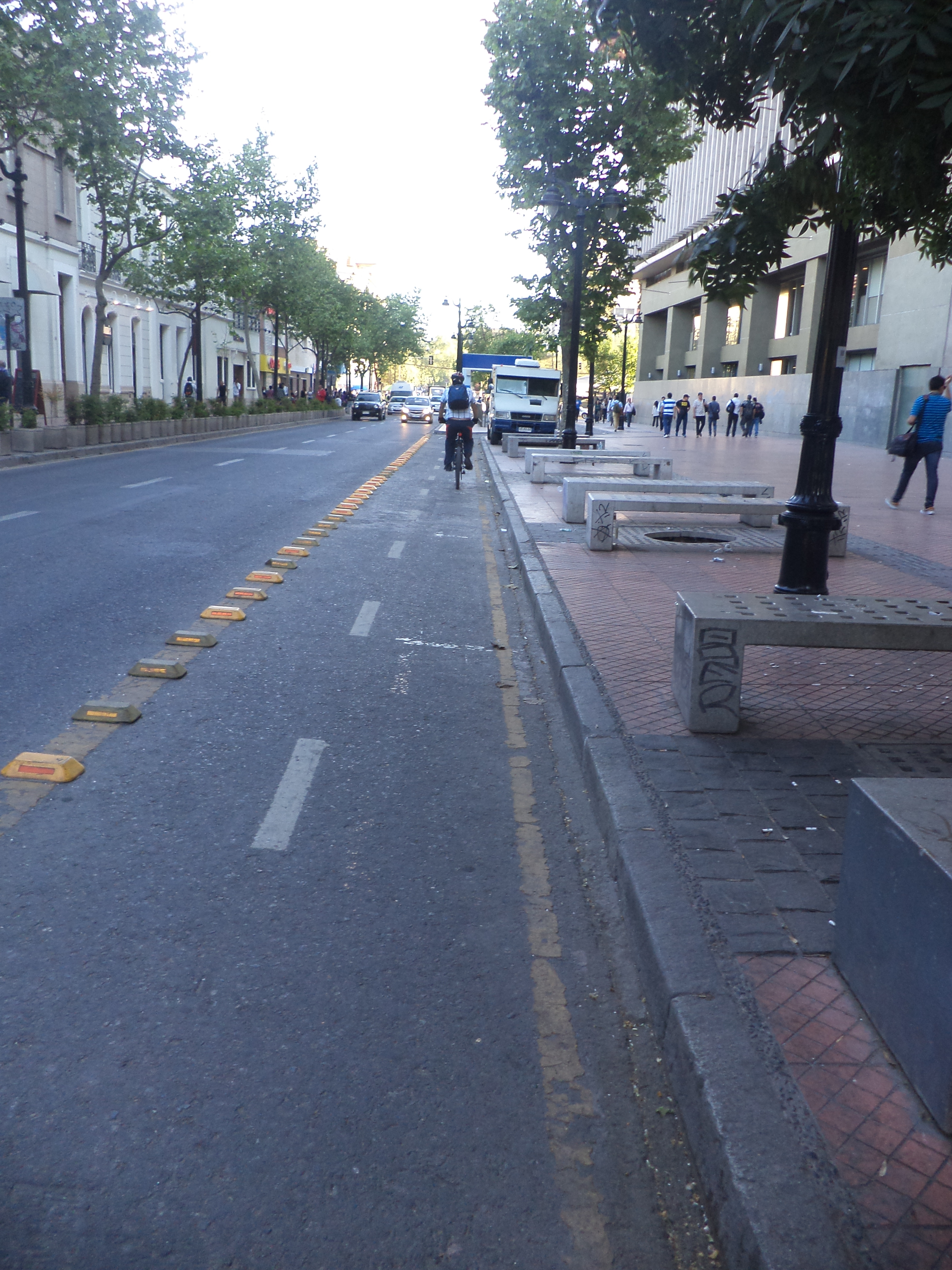 Ciclovía de Pío Nono en Santiago de Chile.